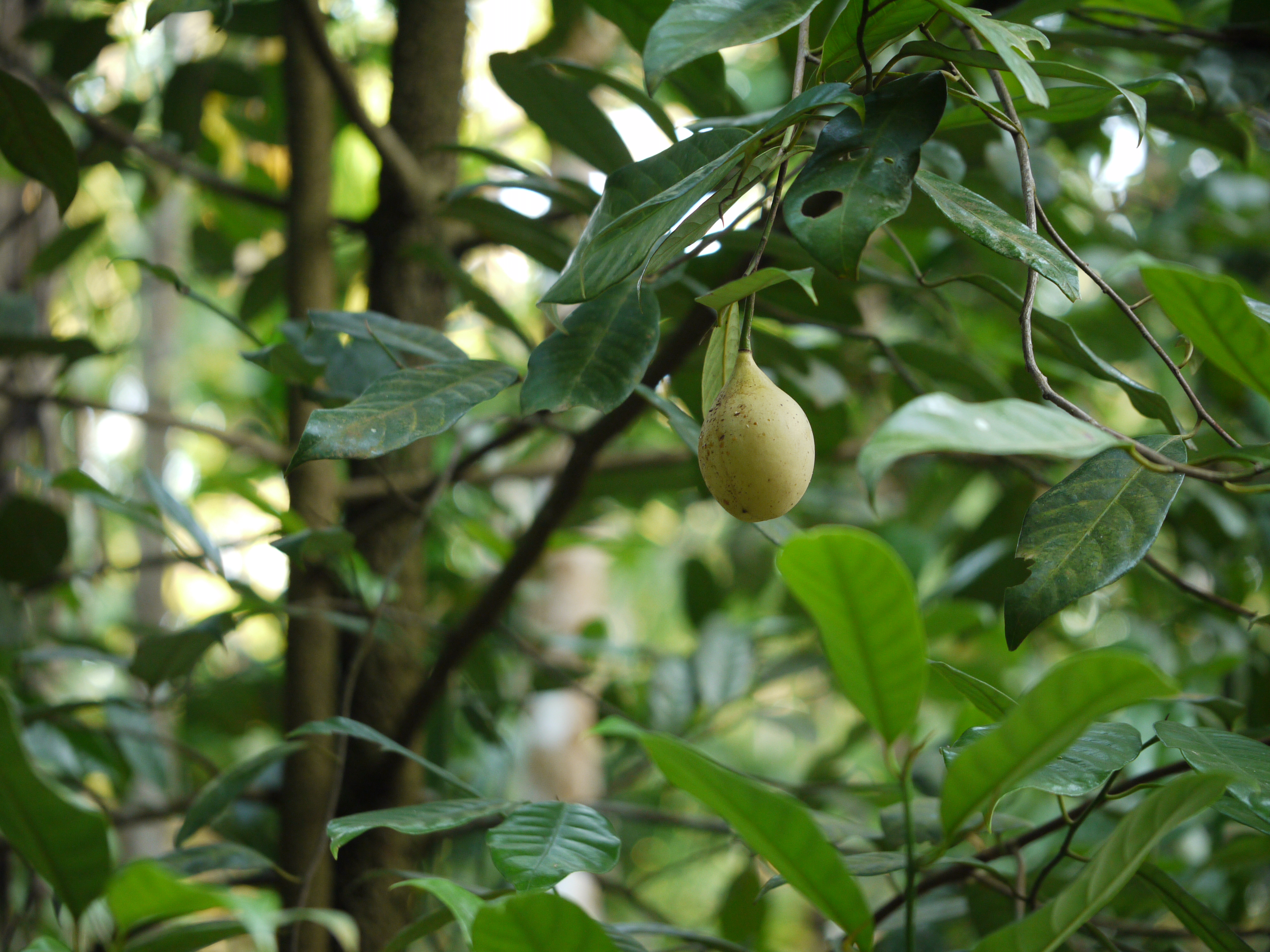 Myristicaceae (nutmeg family) » Myristica fragrans Houtt. my-RIS-ti-kuh -- from the Greek myristikos (fit for annointing) FRAY-granz -- fragrant commonly known as: nutmeg • Assamese: জাইফল jaiphol • Bengali: জাতিফল jatiphala, জায়ফল jayaphala • Garo: joipol • Gujarati: જાયફળ jayaphala • Hindi: जातीफल jati-phal, जायफल jayaphal • Kannada: ಜಾಕಾಯಿ jakayi, ಜಾತೀಫಲ jatiphala • Kashmiri: जातीफलम् jatiphalam, ज़ाफल् zaphal • Khasi: jaiphol • Konkani: जायफळ jayaphal • Malayalam: ജാതി jathi, ജാതിക്കാ jathikka • Manipuri: জায়ফল jayfal • Marathi: जातीफल jatiphala, जायफळ jayaphala • Nepali: जाइफल् jaiphal • Oriya: ଜାଇଫଳ jaiphala • Punjabi: ਜਾਫਲ jafal • Sanskrit: जातिफल jatiphala • Tamil: சாதிக்காய் cati-k-kay • Telugu: జాజికాయ jajikaya • Tibetan: dza ti pha la • Urdu: جائيپهل jayaphal Native to: Banda Islands of Indonesia; cultivated elsewhere References: Gernot Katzer's Spice Pages • Wikipedia • ENVIS - FRLHT • DDSA